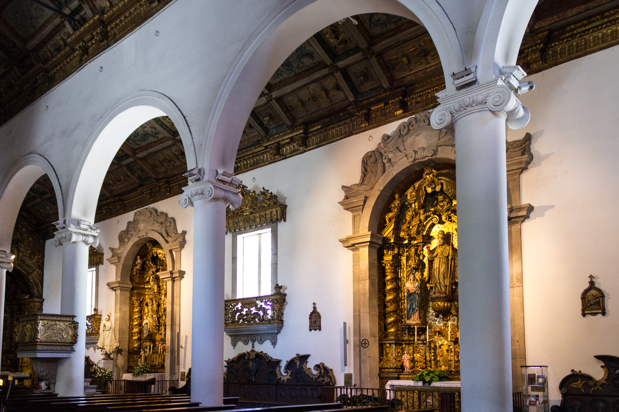 Santuário do Senhor de Matosinhos, Porto metropolitan area